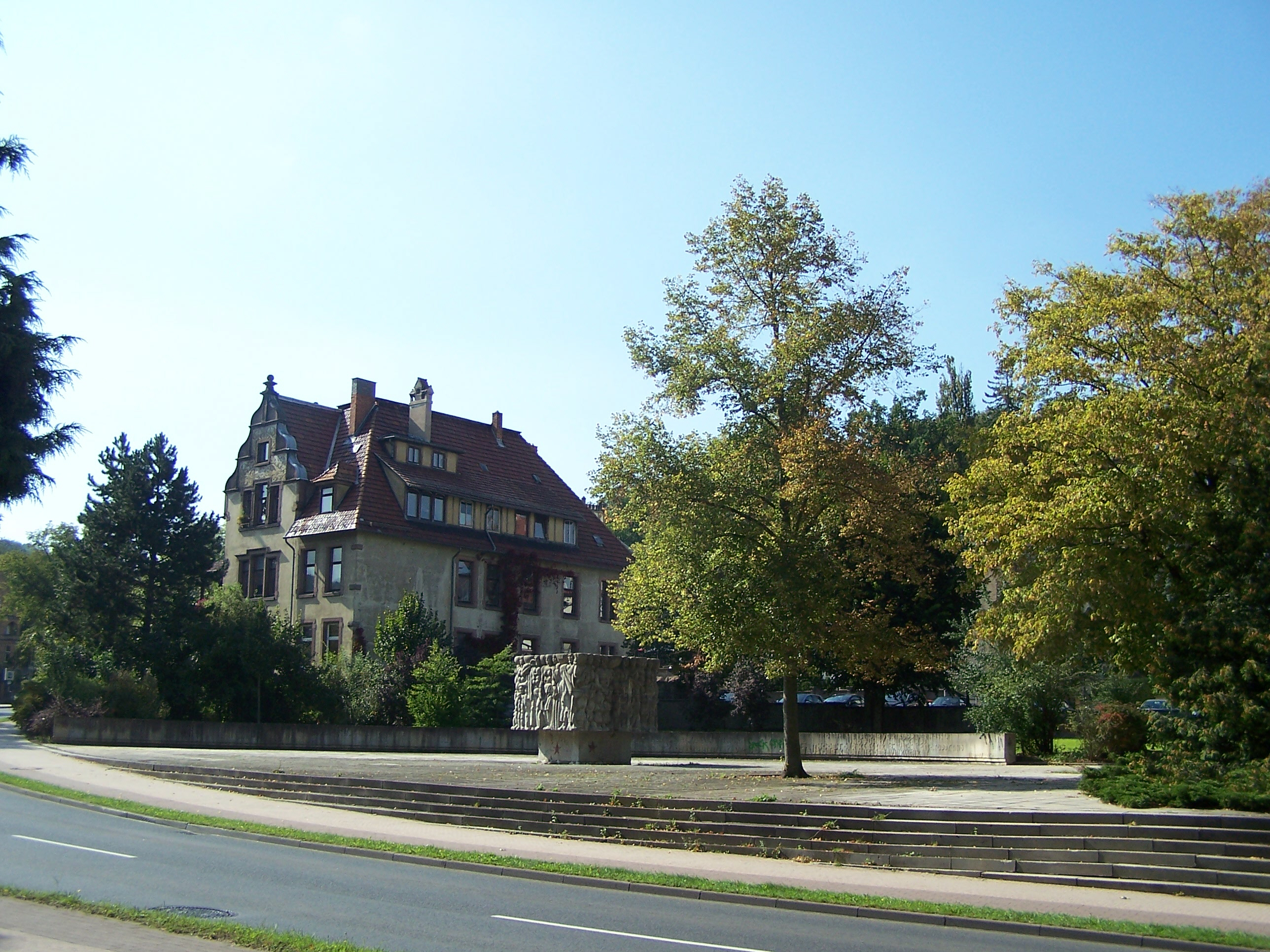 Gesamtansicht von der Wartburgallee gesehen.